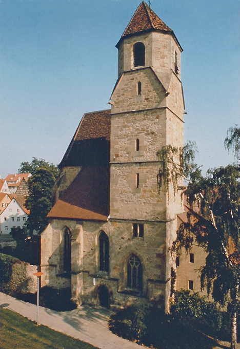 Turm und Chor des Heilig-Geist-Spitals Markgröningen